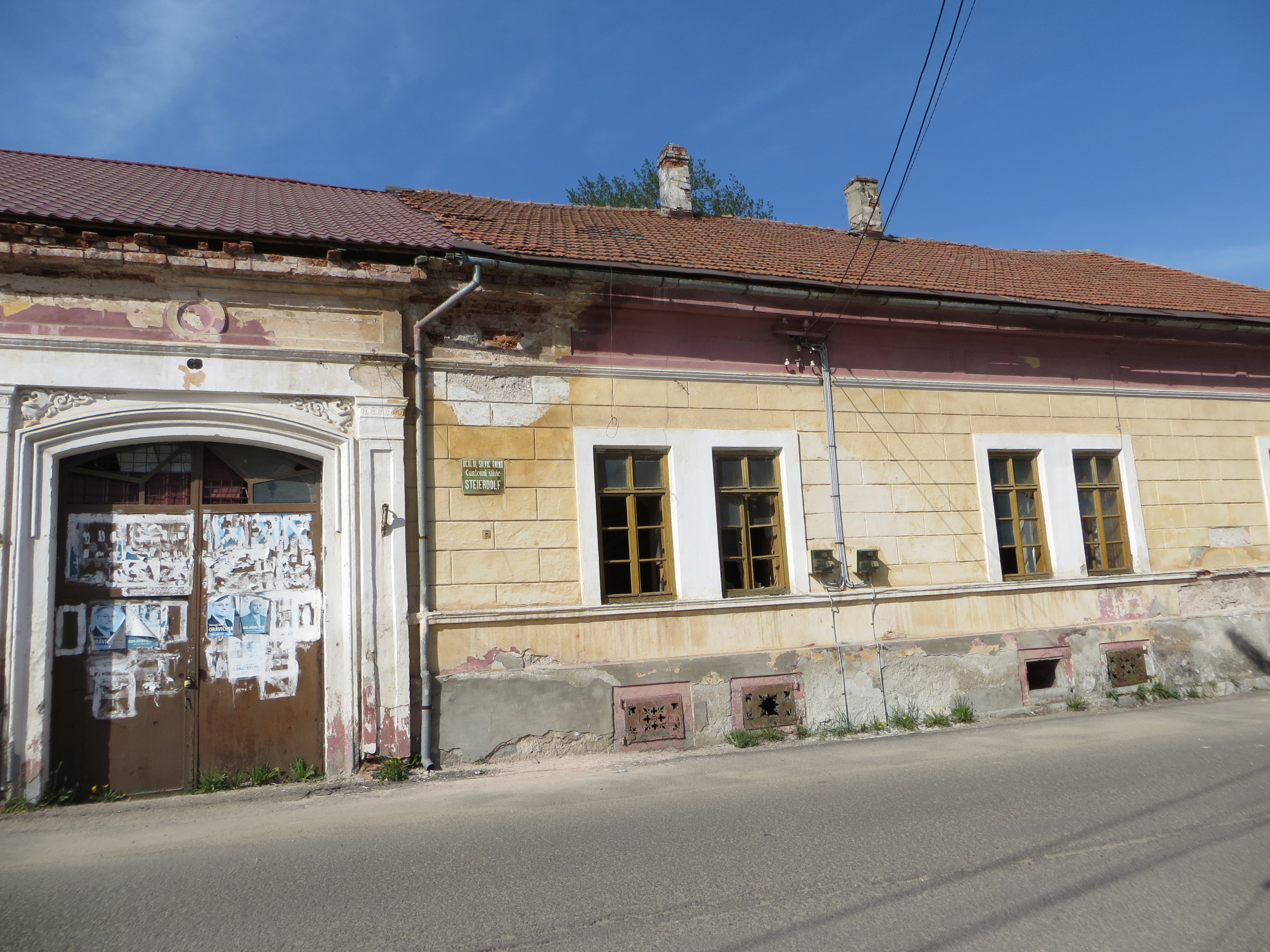 Spital, azi dezafectat 01